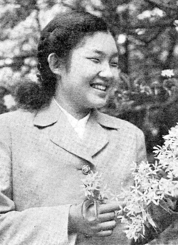 順宮厚子内親王